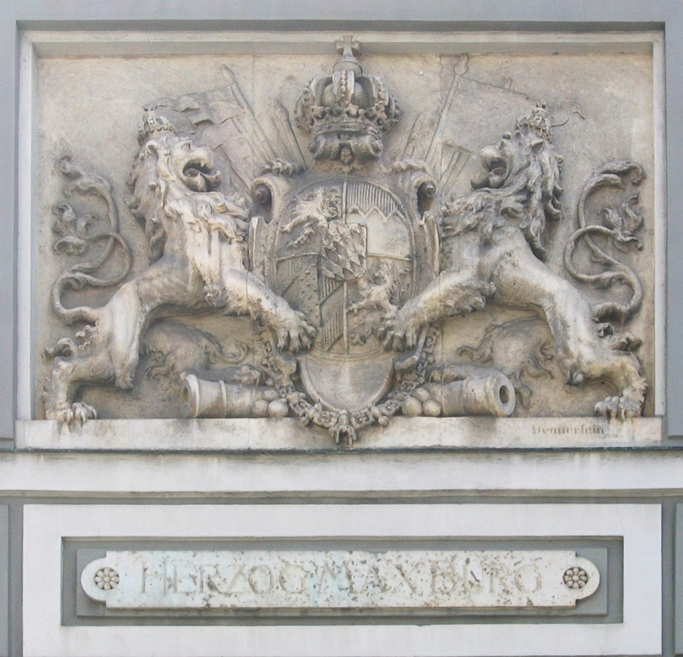 München, Turm der Herzog-Max-Burg, Pacellistr.5, Detail